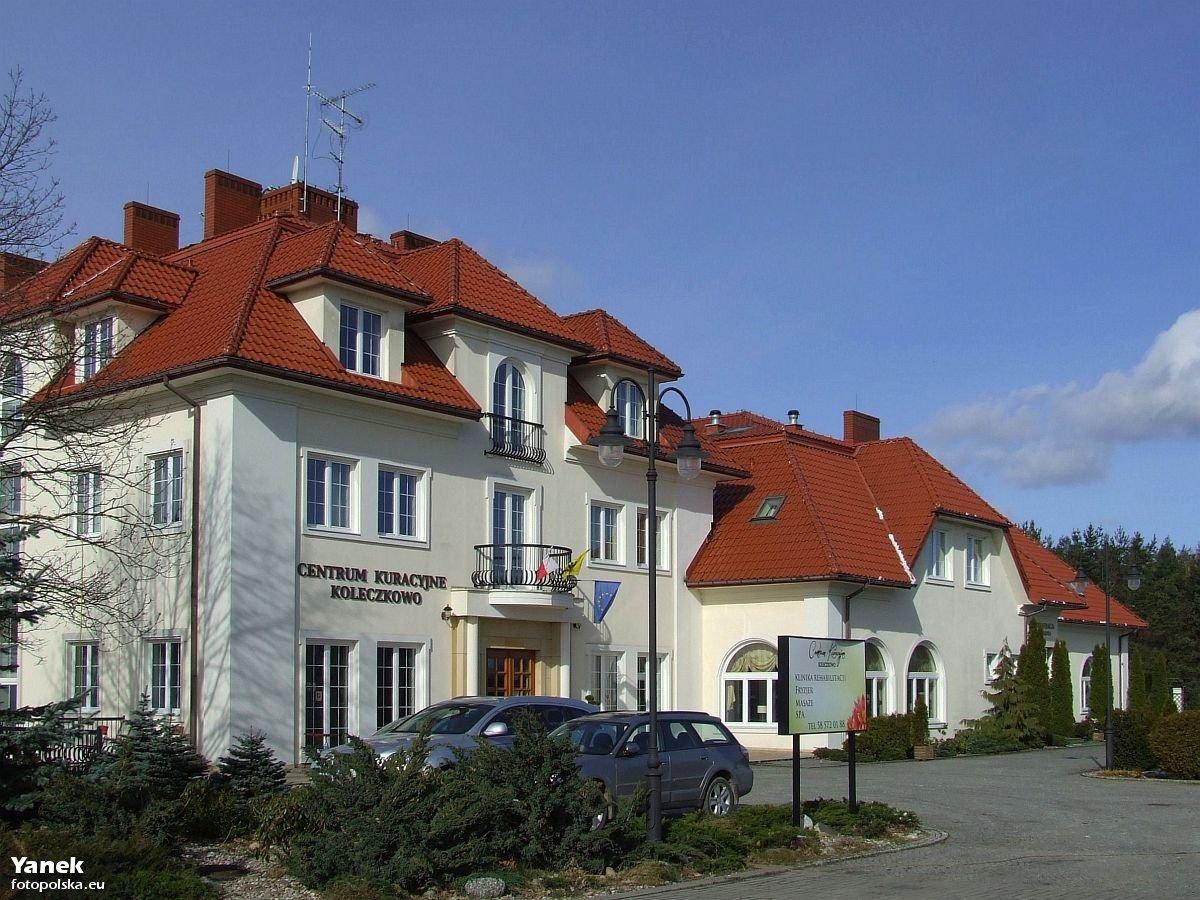 Centrum Kuracyjne w Koleczkowie.